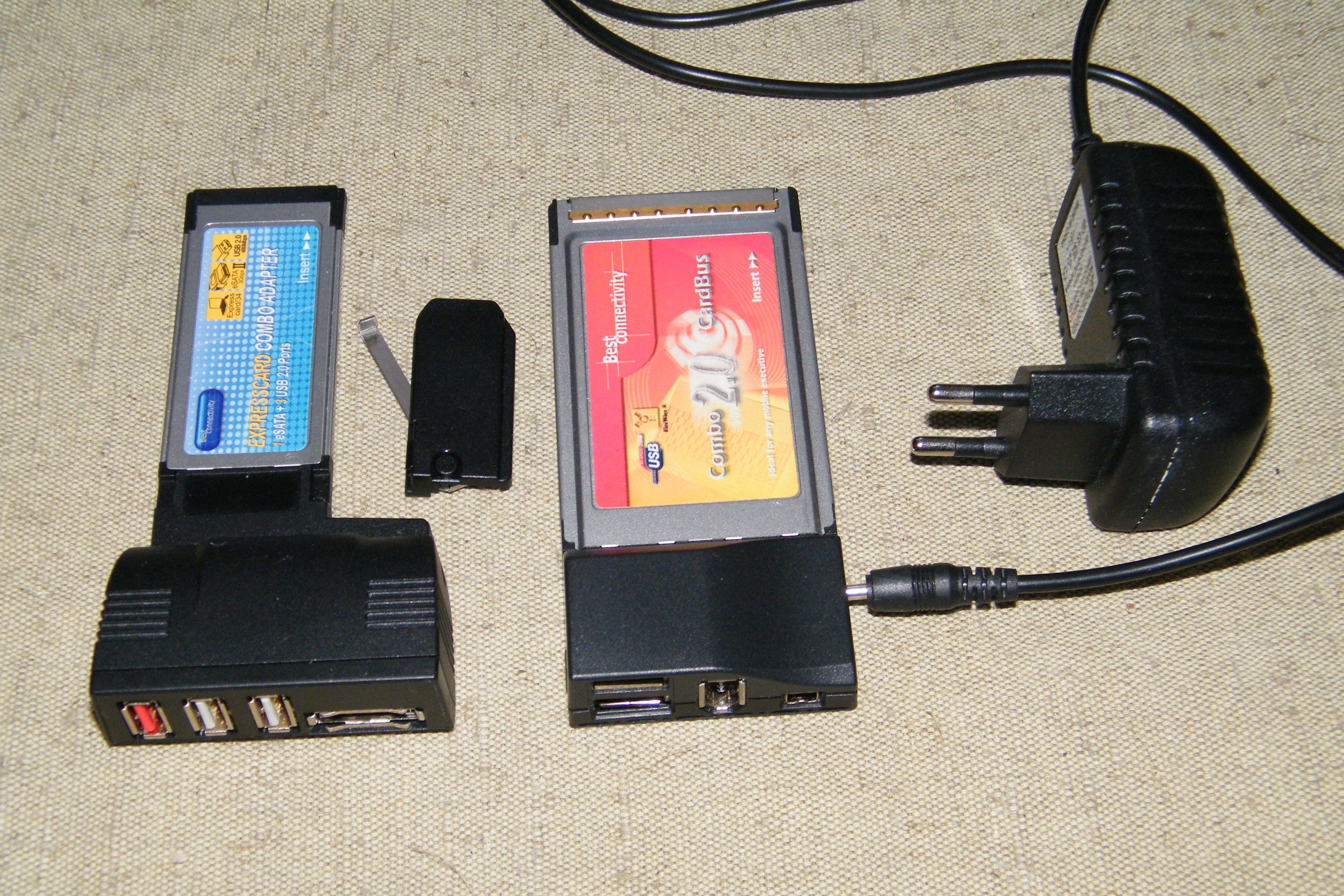 CardBus и ExpressCard-34 с переходником на 54